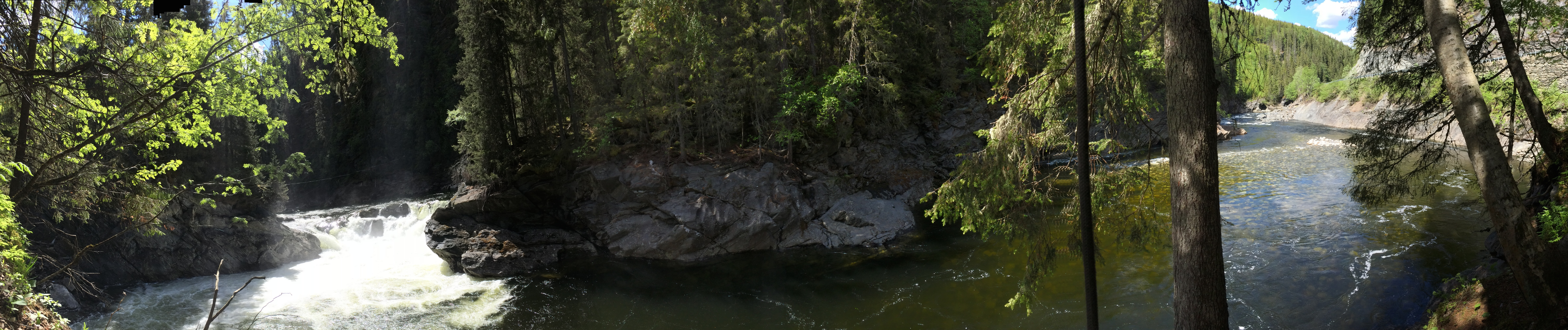 Eggafossen i elva Gaula ved Fylkesvei 30 i Holtålen kommune i Sør-Trøndelag fylke 2. juni 2014